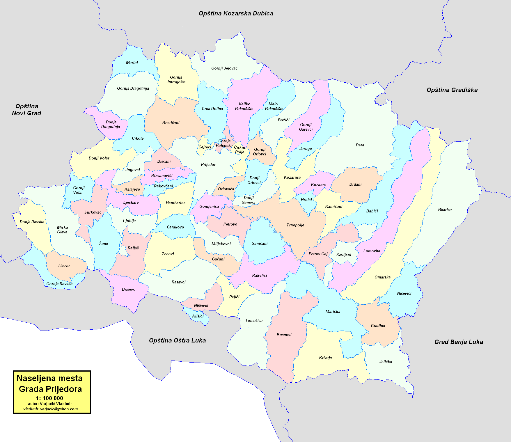 Grad Prijedor